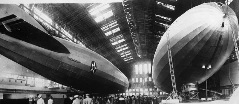 "Zwei gute Freunde". Z.R.3 rechts und Shenandoah links in der Marine-Luftschiffhalle in Lakehurst. An Hand dieses Bildes kann man sich die riesige Größe der Luftschiffhalle in Lakehurst vorstellen.